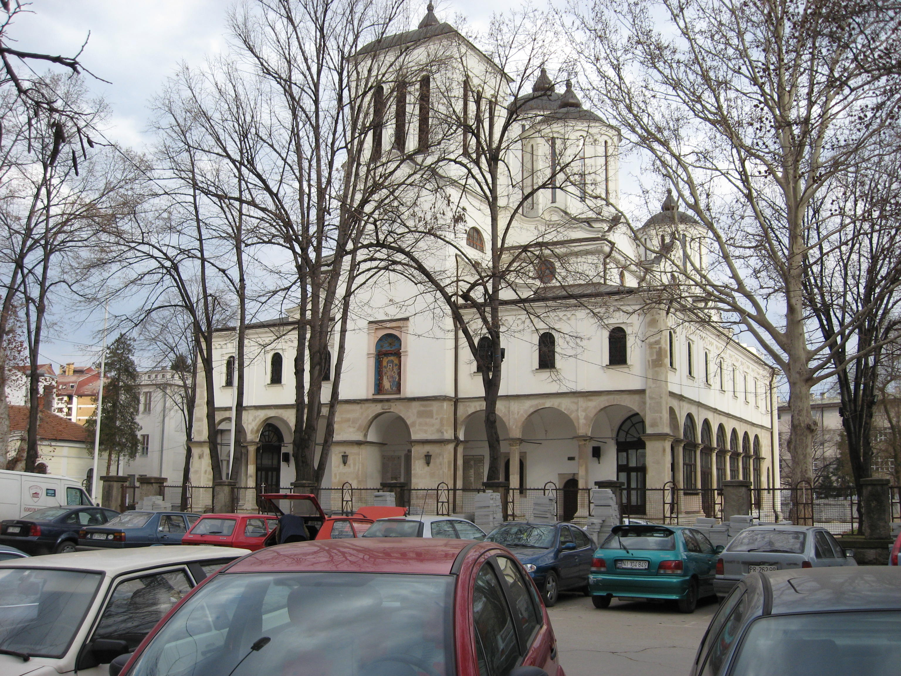 Саборна црква у Нишу